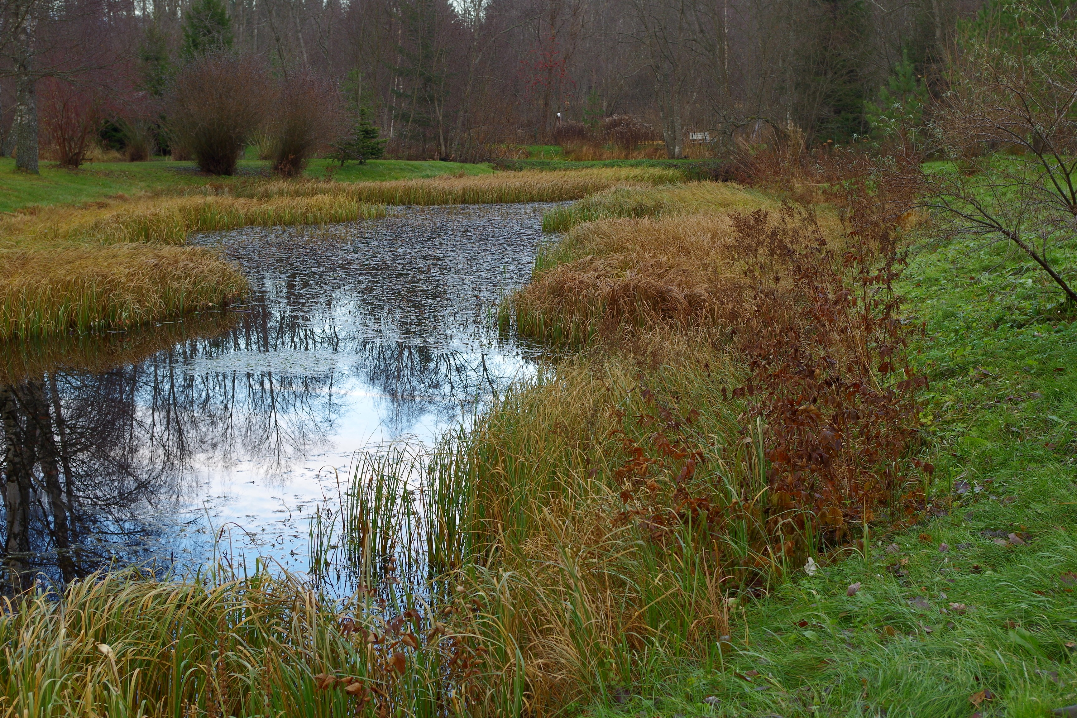 Keila jõe oru läänenõlvas asuvad veerikkad Lohu (Pontaki) allikad, mille tõusuallikad on koondunud tiikideks.